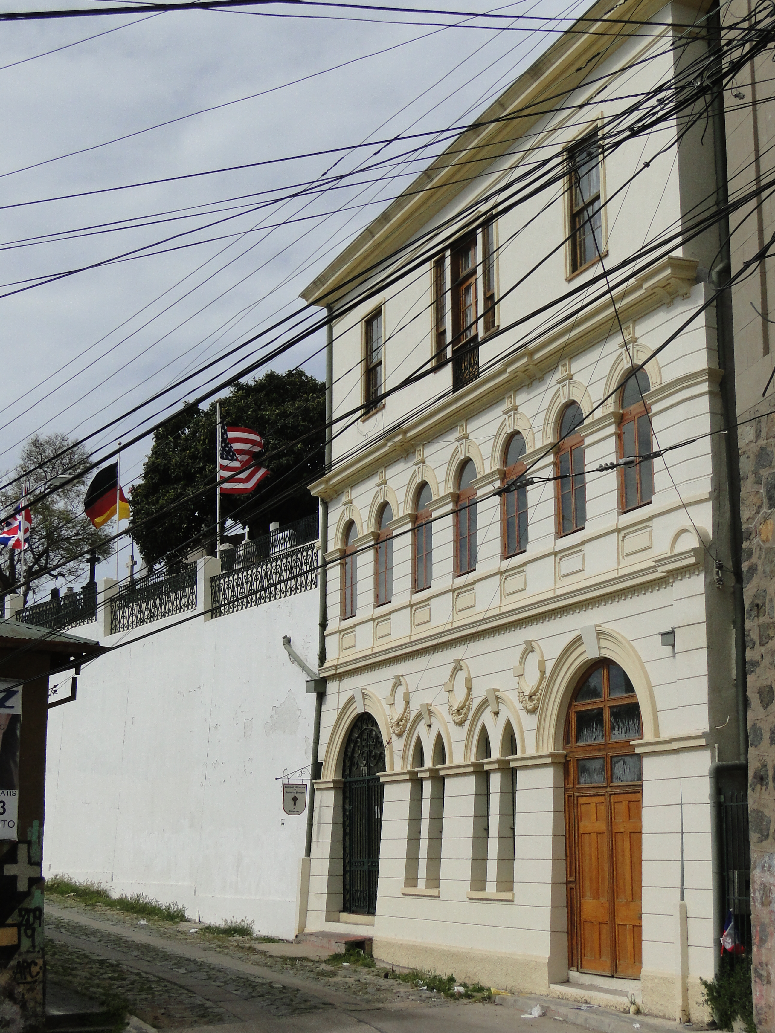 Cementerio de Disidentes o Cementerio Inglés de Valparaíso This is a photo of a national monument in Chile: 986